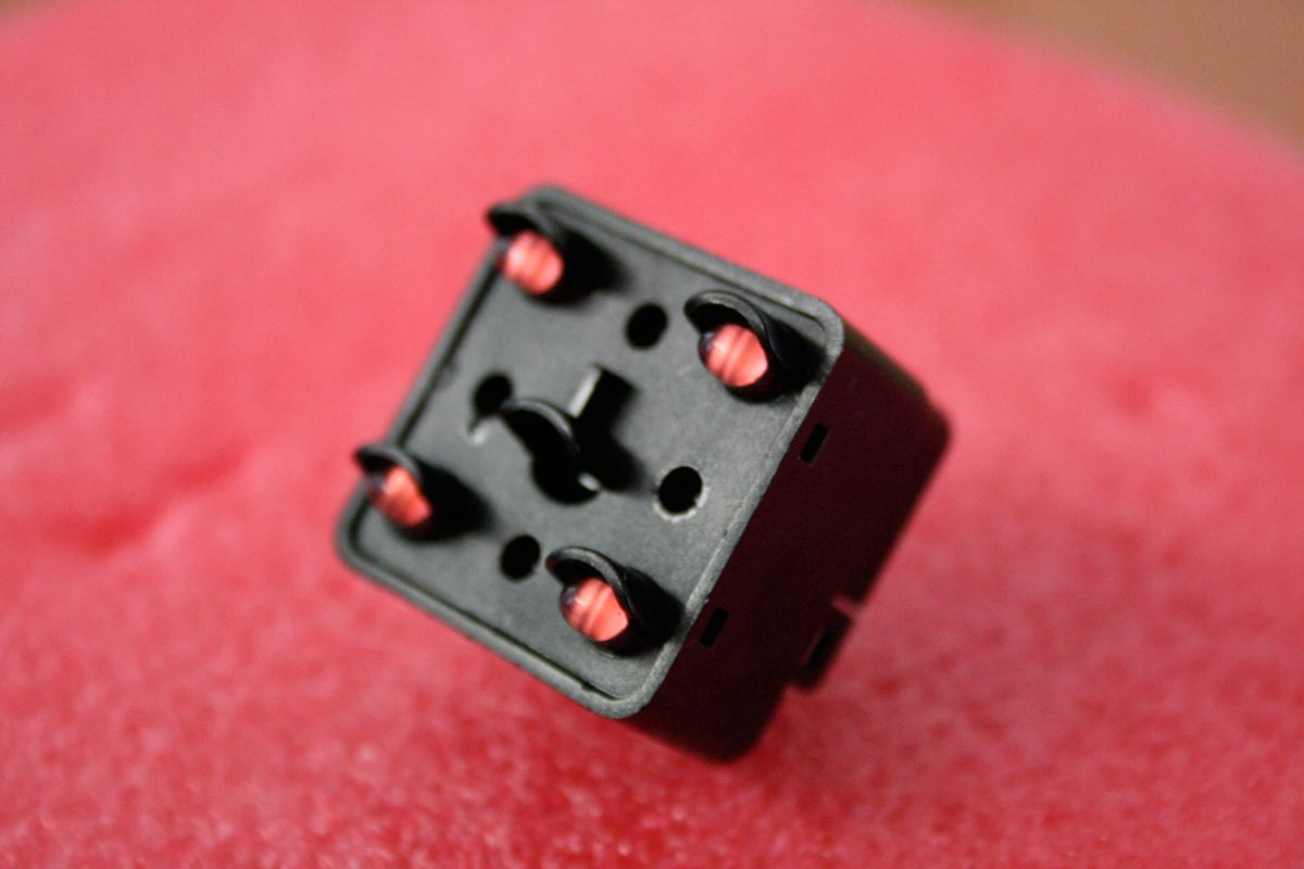 Cluster monocolor de 4 leds rojo